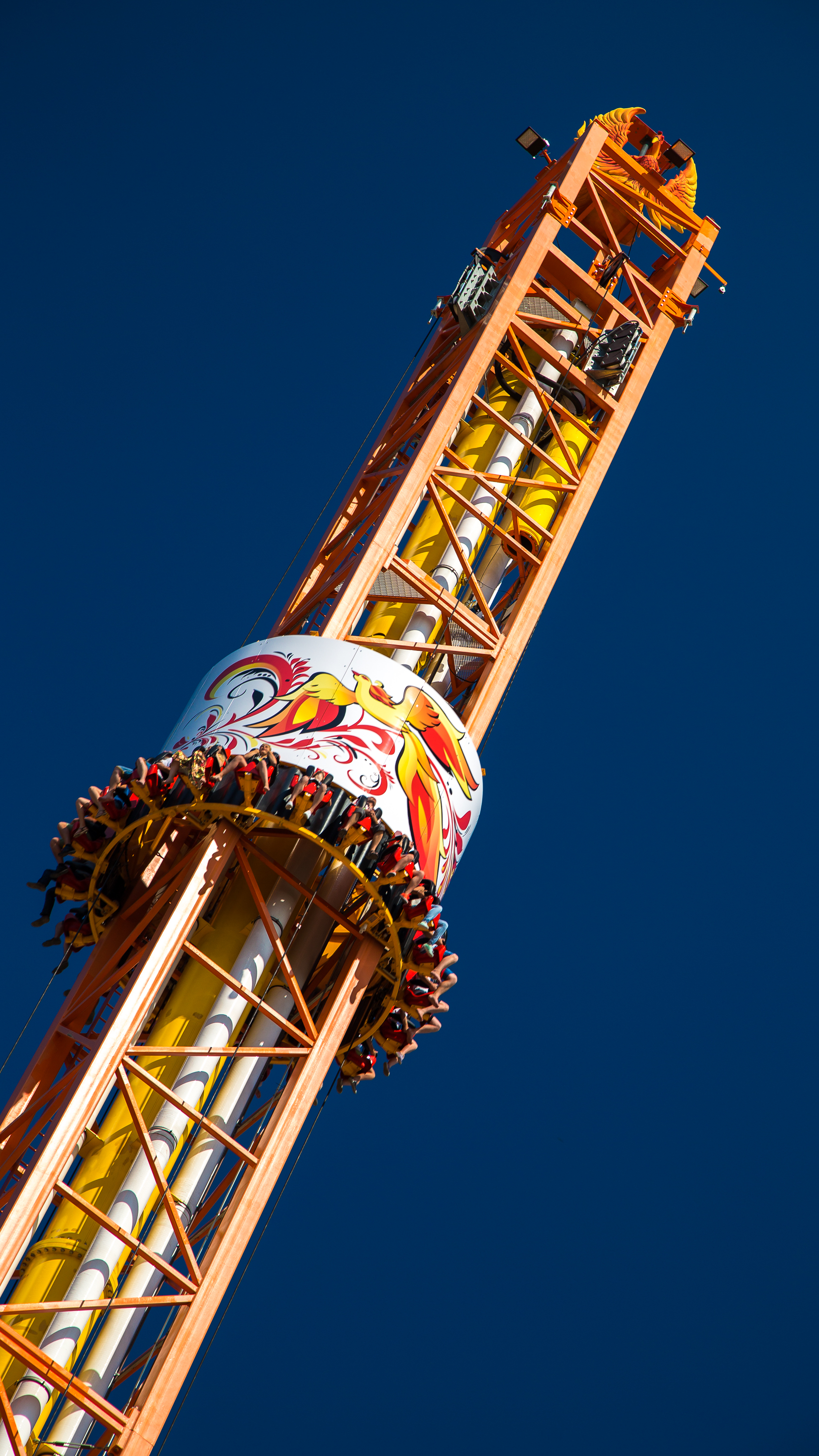 Жар-птица. Сочи Парк. Самый высокий в России аттракцион свободного падения - 65 метров!